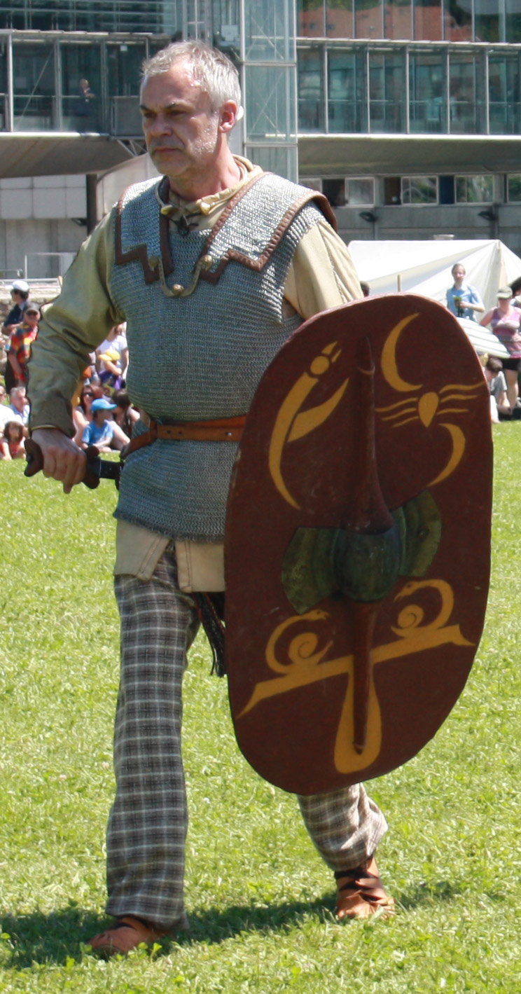 guerrier